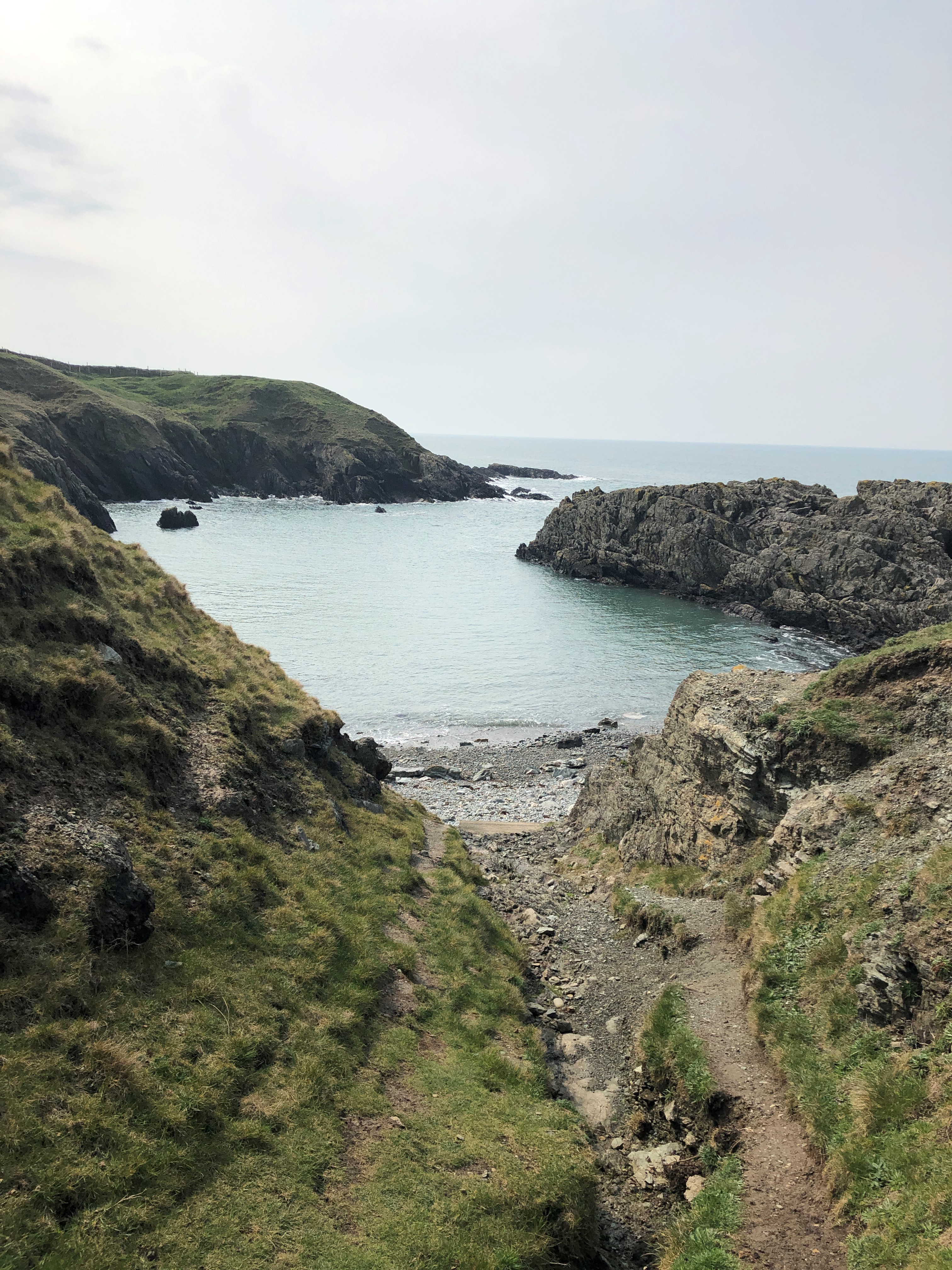 Porth Gwylan